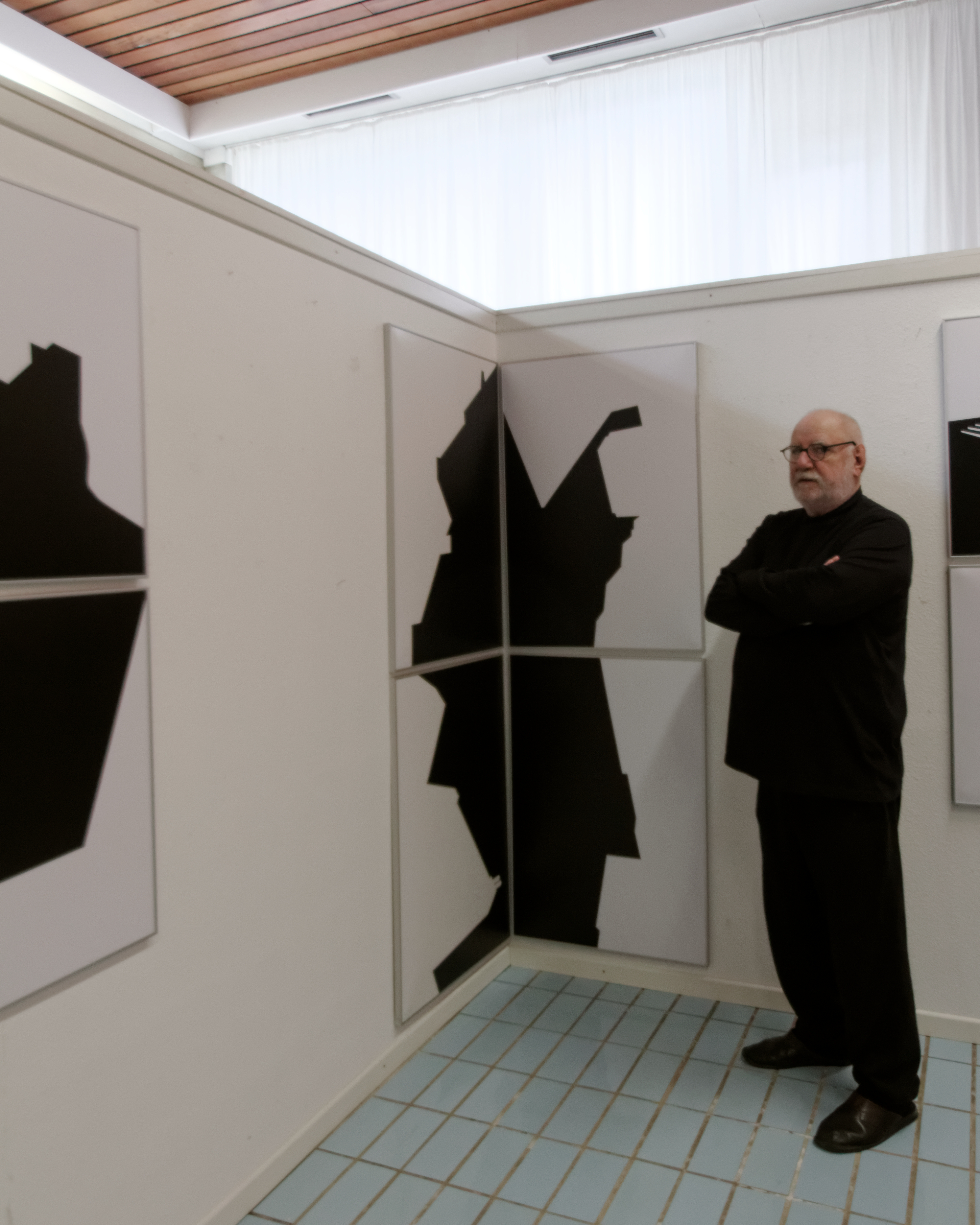 Theo Windges, Krefelder Fotokünstler